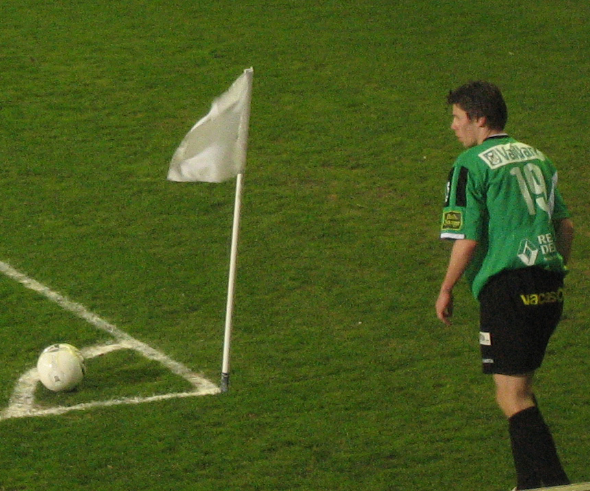 Eckball von Stijn De Smet beim Spiel Cercle Brugge gegen KSC Lokeren.